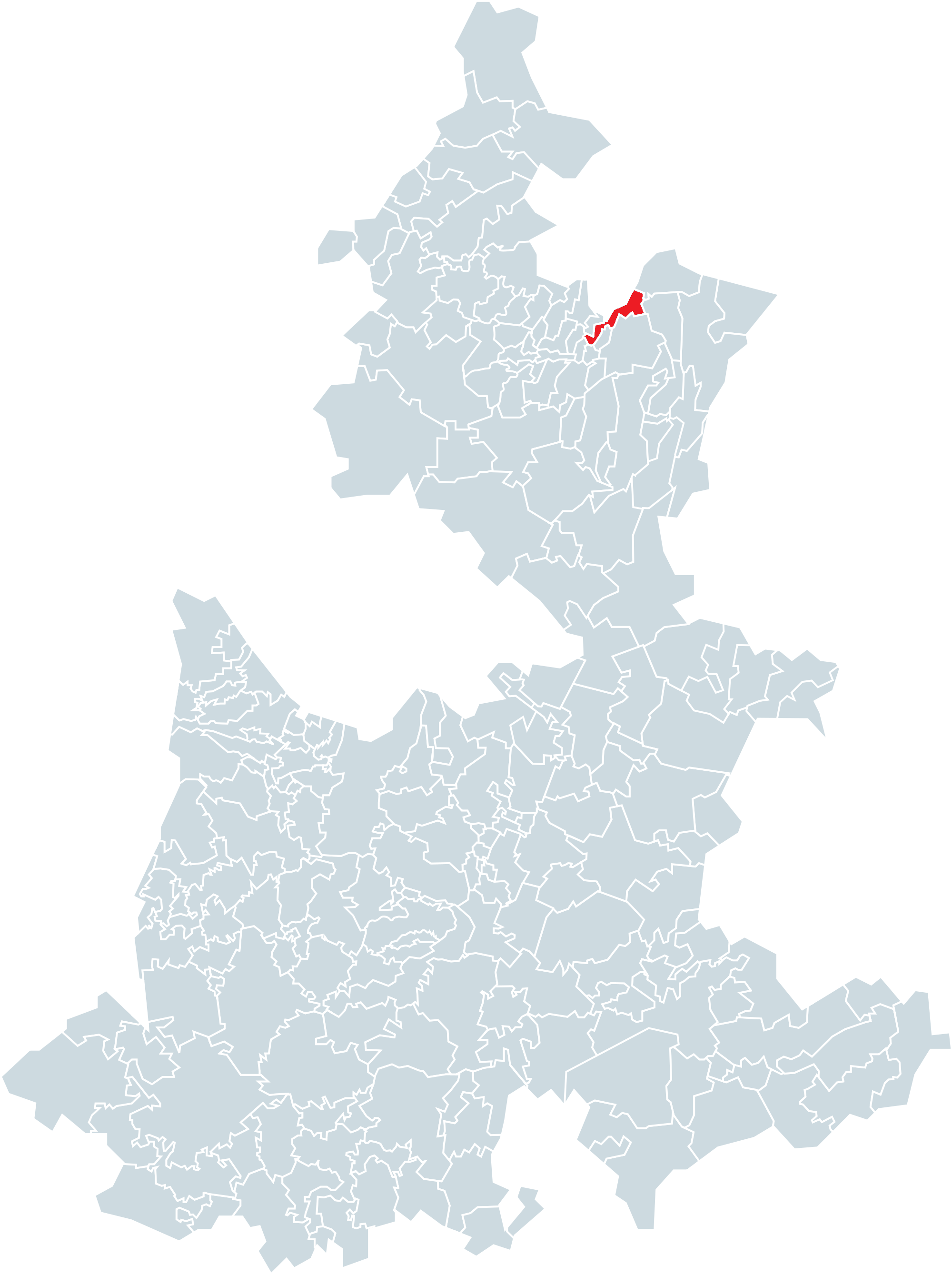 Municipio de Tuzamapan de Galeana